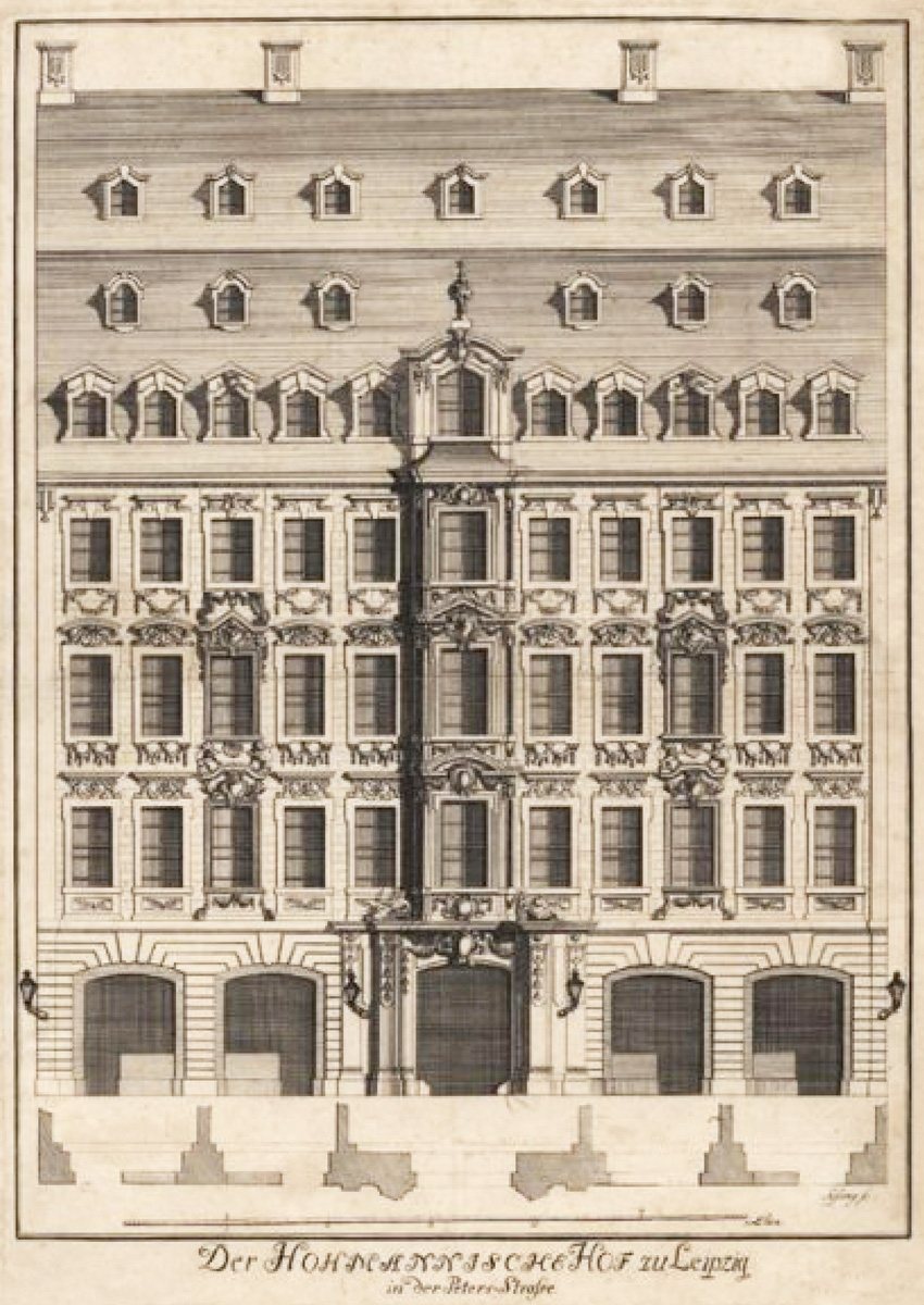 Der Hohmannische Hof zu Leipzig in der Peters-Strasse